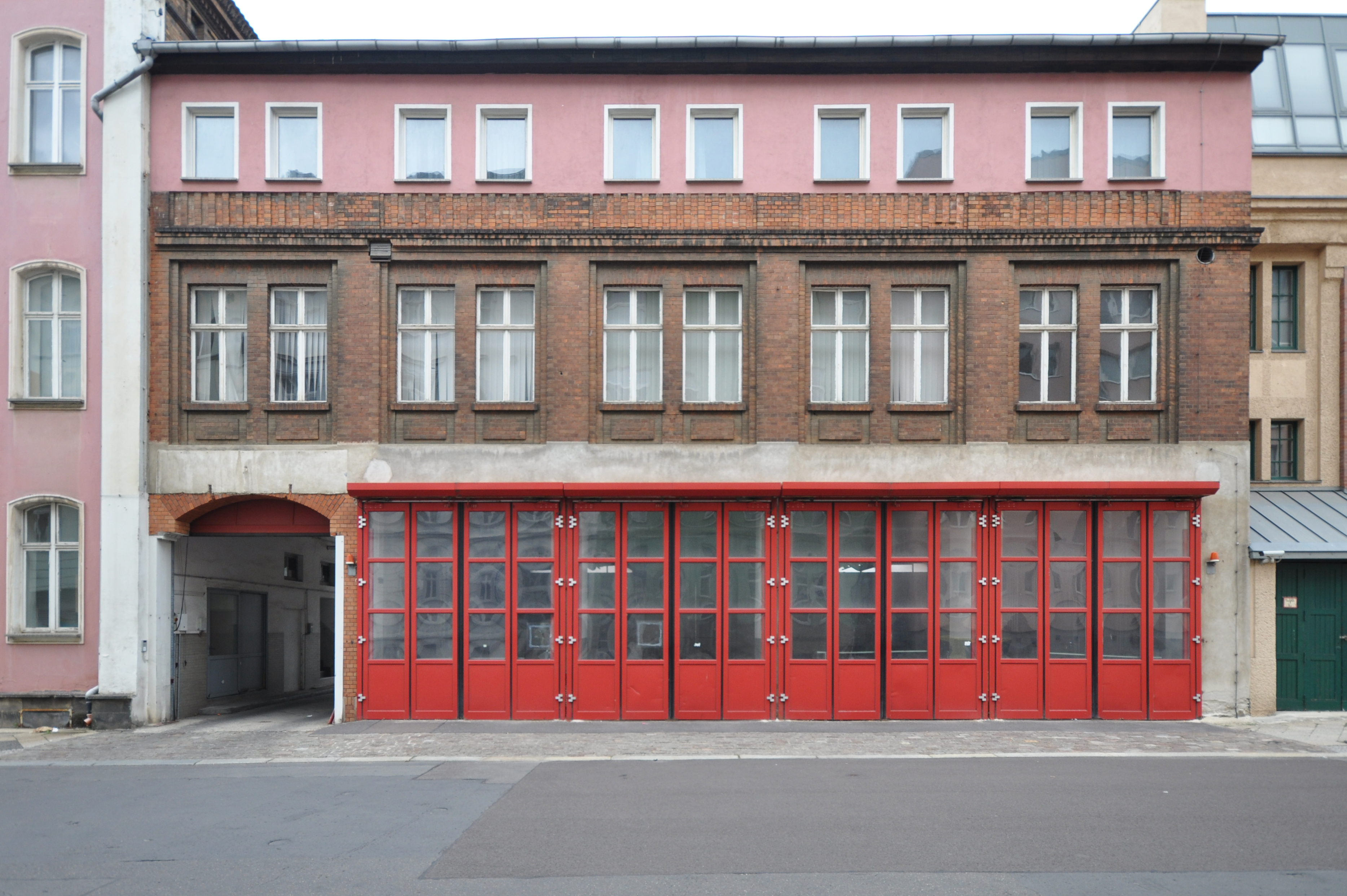 Feuerwache Ernst-Reuter-Allee 42 in Magdeburg-Altstadt. This is a photograph of an architectural monument.It is on the list of cultural monuments of Magdeburg